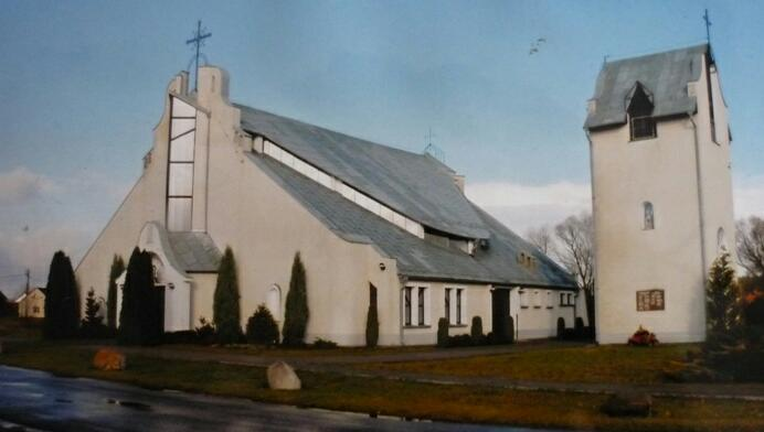 Kościół Matki Bożej Królowej i św. Antoniego w Bukowie